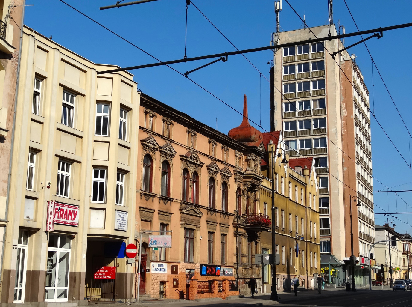 Ulica Dworcowa w Bydgoszczy na odcinku od ul. Królowej Jadwigi do dworca PKP